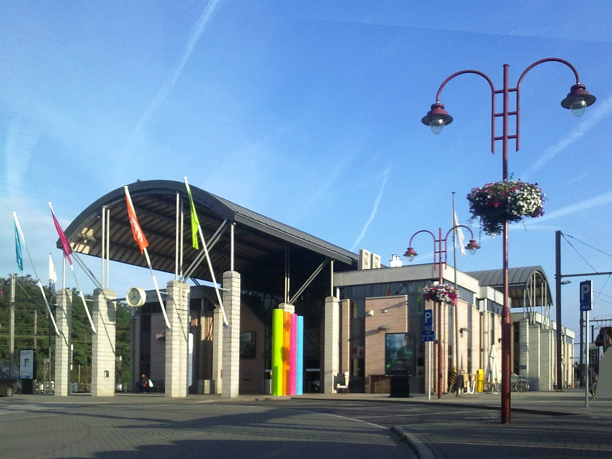 Gare d'Ottignies en Brabant Wallon - Vue extérieure en août 2011 - point de vue redressé